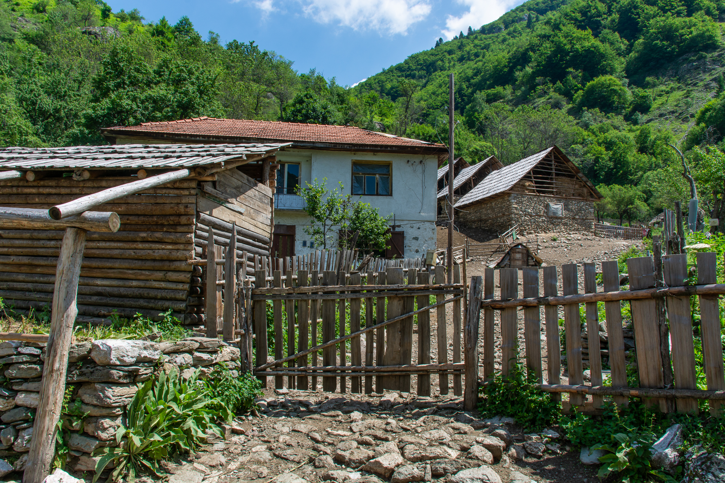 Куќа во село Жужње